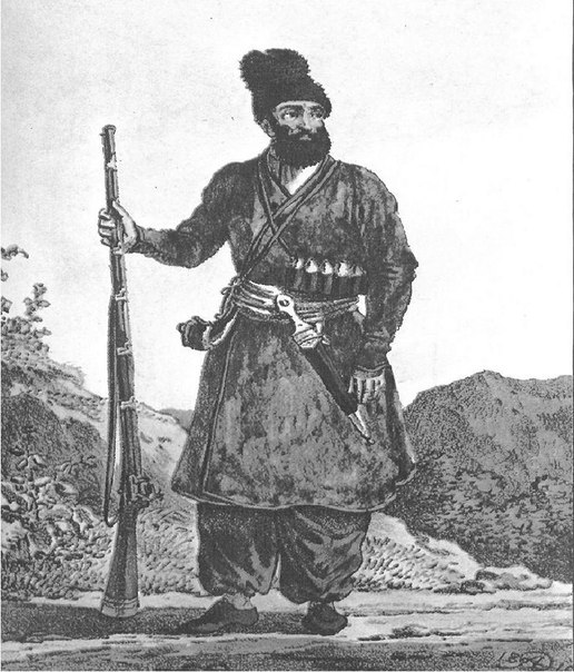 Талыш горец - Литография XIX века